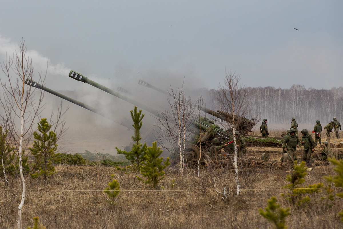 2А65 «Мста-Б» 120-й гвардейской артиллерийской бригады на чебаркульском полигоне.